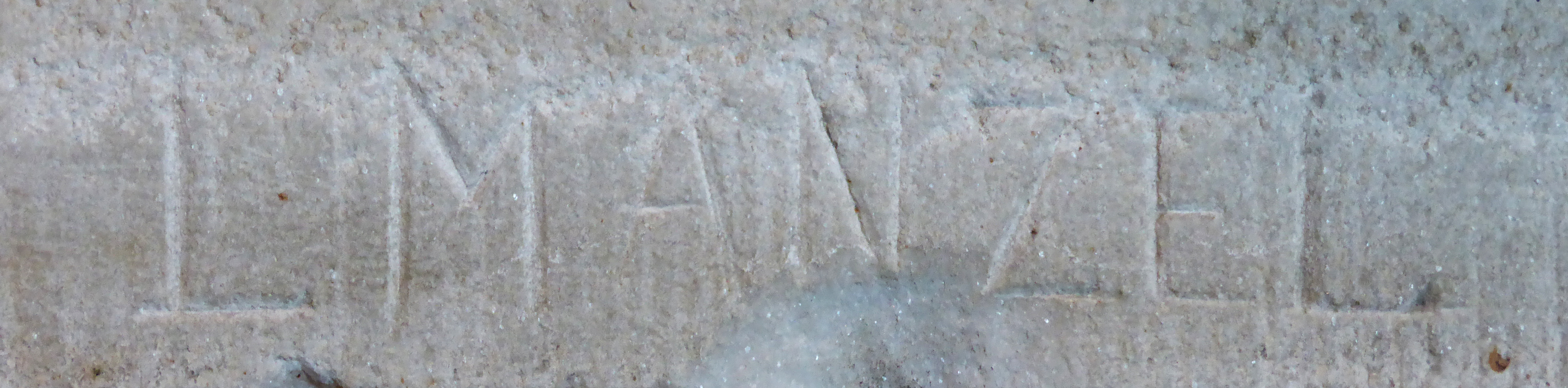 Marmorbüste Wilhelm II. vom Bildhauer Ludwig Manzel von 1906 vor dem Hofzug Kaiser Wilhelms II., Baujahr 1888. Breslauer Aktiengesellschaft für Eisenbahnwagenbau. Ausgestellt im Deutschen Technikmuseum in Berlin. Inventarnummer: VBM E-B-5009. Wikipedianische KulTour am 10. Oktober 2015 in der Ausstellung des Museums.